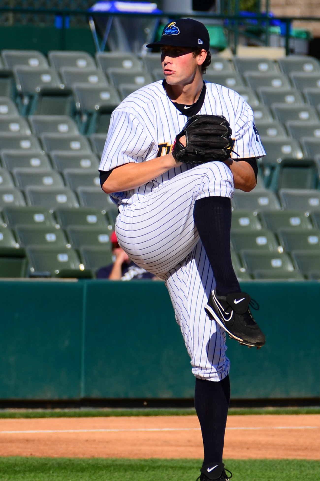 Starting Pitcher Nik Turley